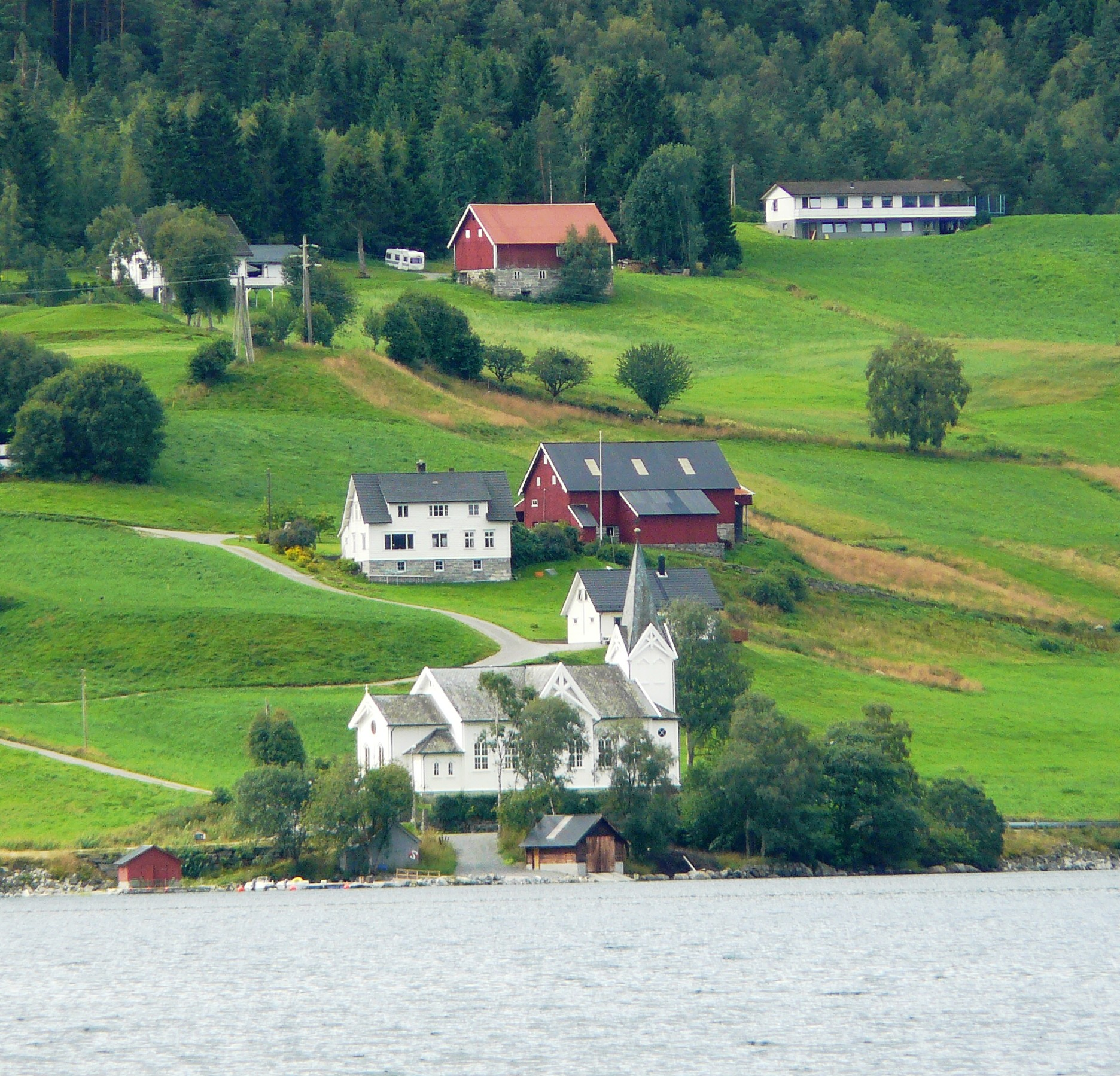 Gimmestad church in Gloppen, Sogn og Fjordane, Norway.jpg